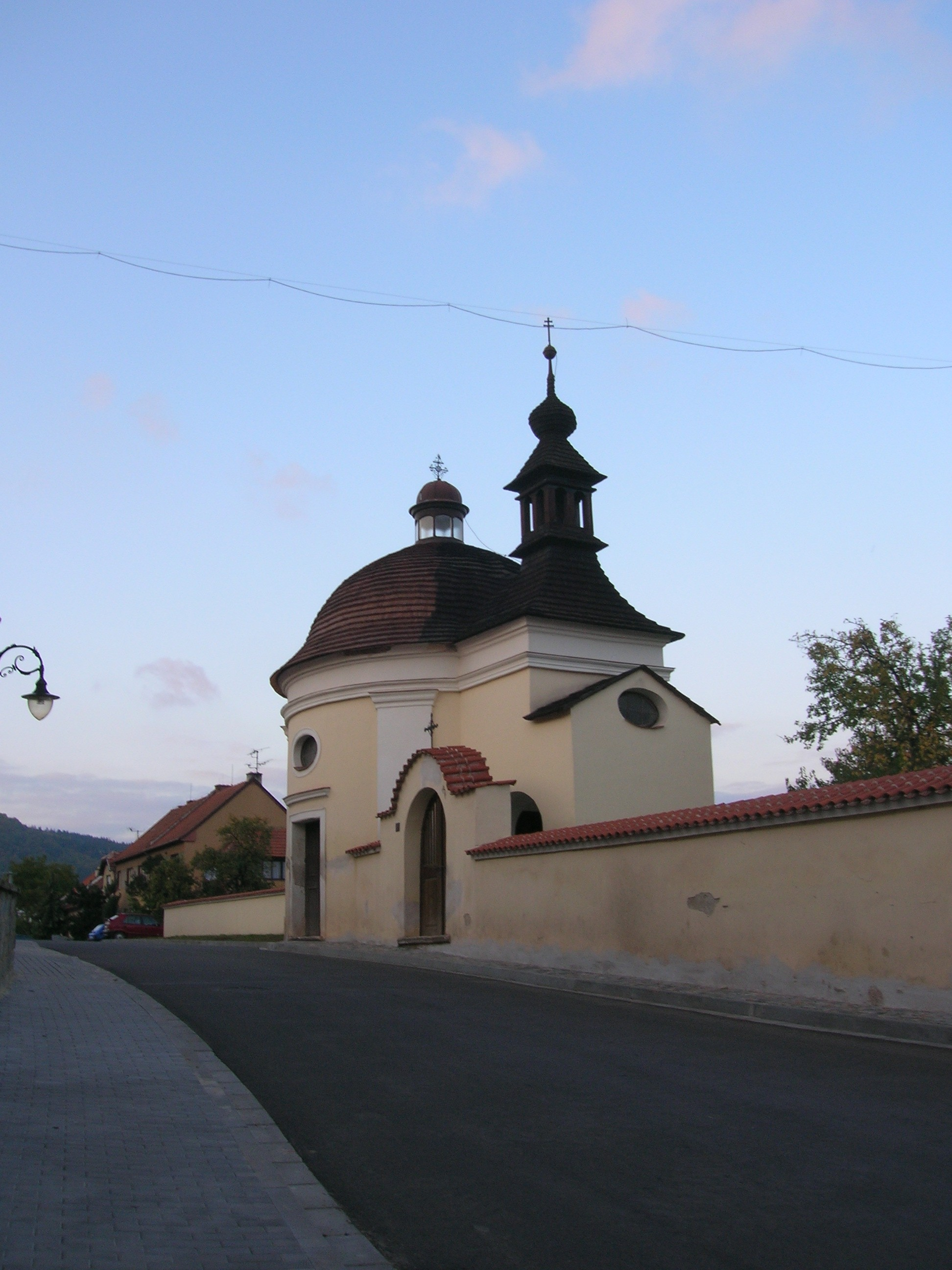 Chapel of St.Antonín Paduánský